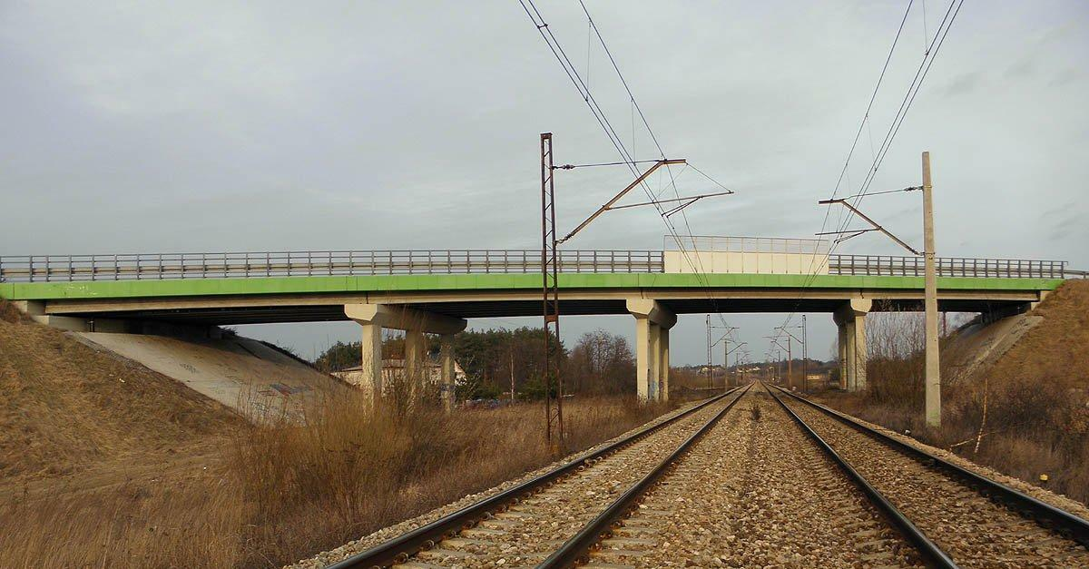 Wiadukt nad linią kolejową nr 26 na drodze krajowej nr 12.